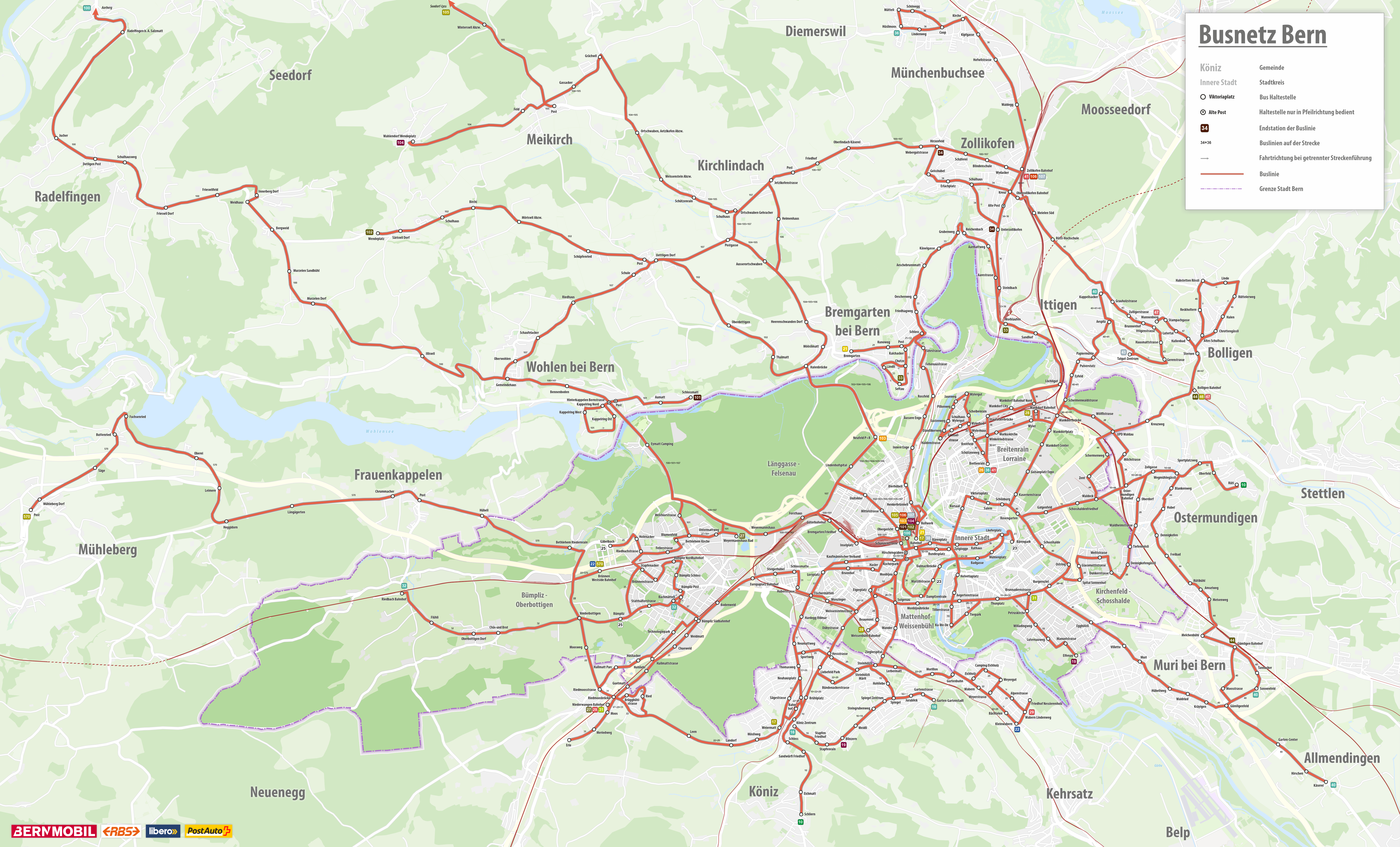 Busnetz der Stadt Bern und Umgebung, ab 15. Dezember 2019